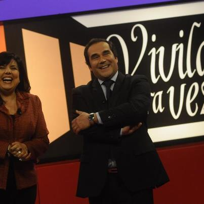 Humberto de Vargas con María Inés Obaldía